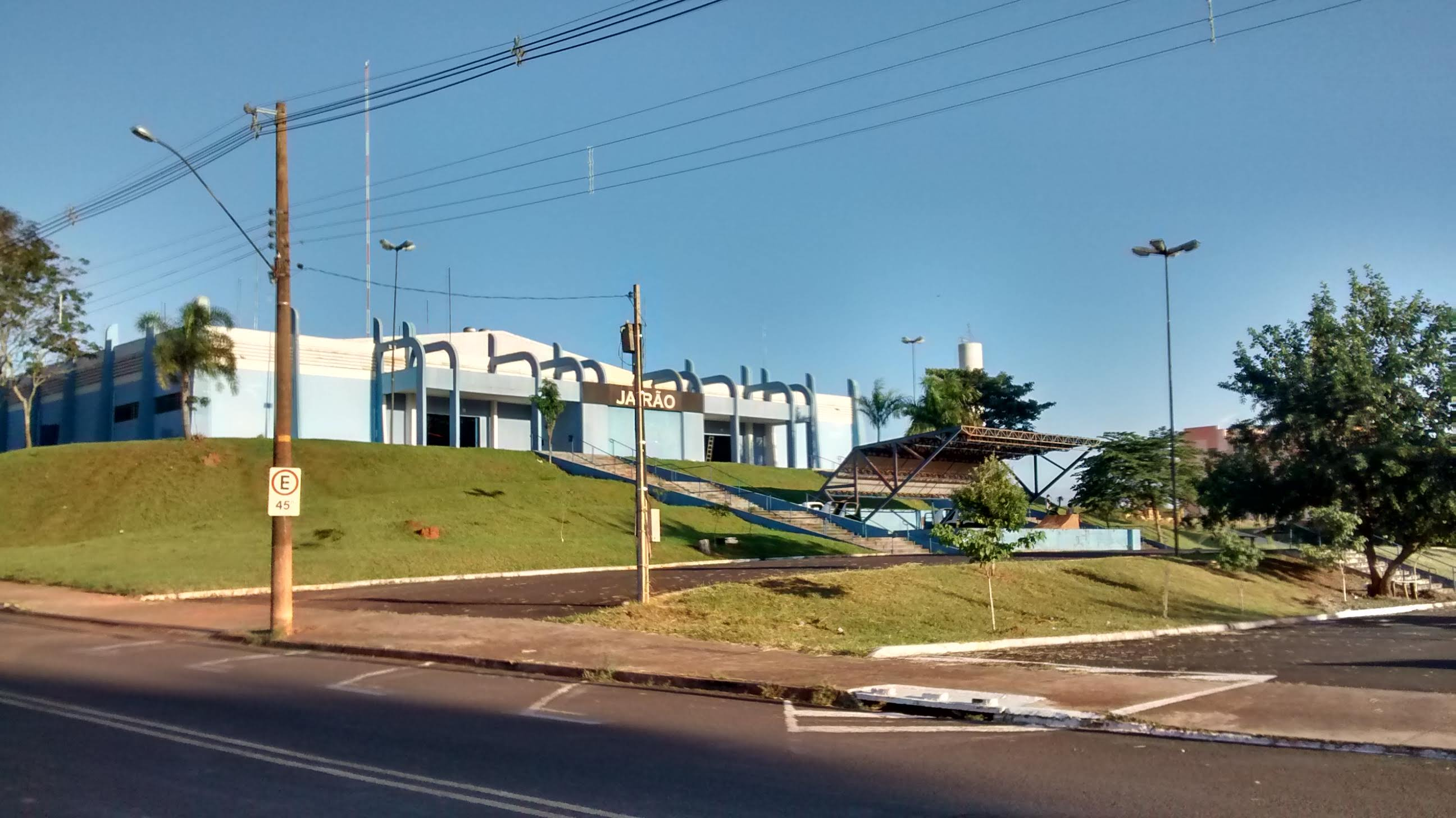 Estádio Ginásio Municipal Jairo Ferreira dos Santos (Jairão) em Assis (São Paulo)